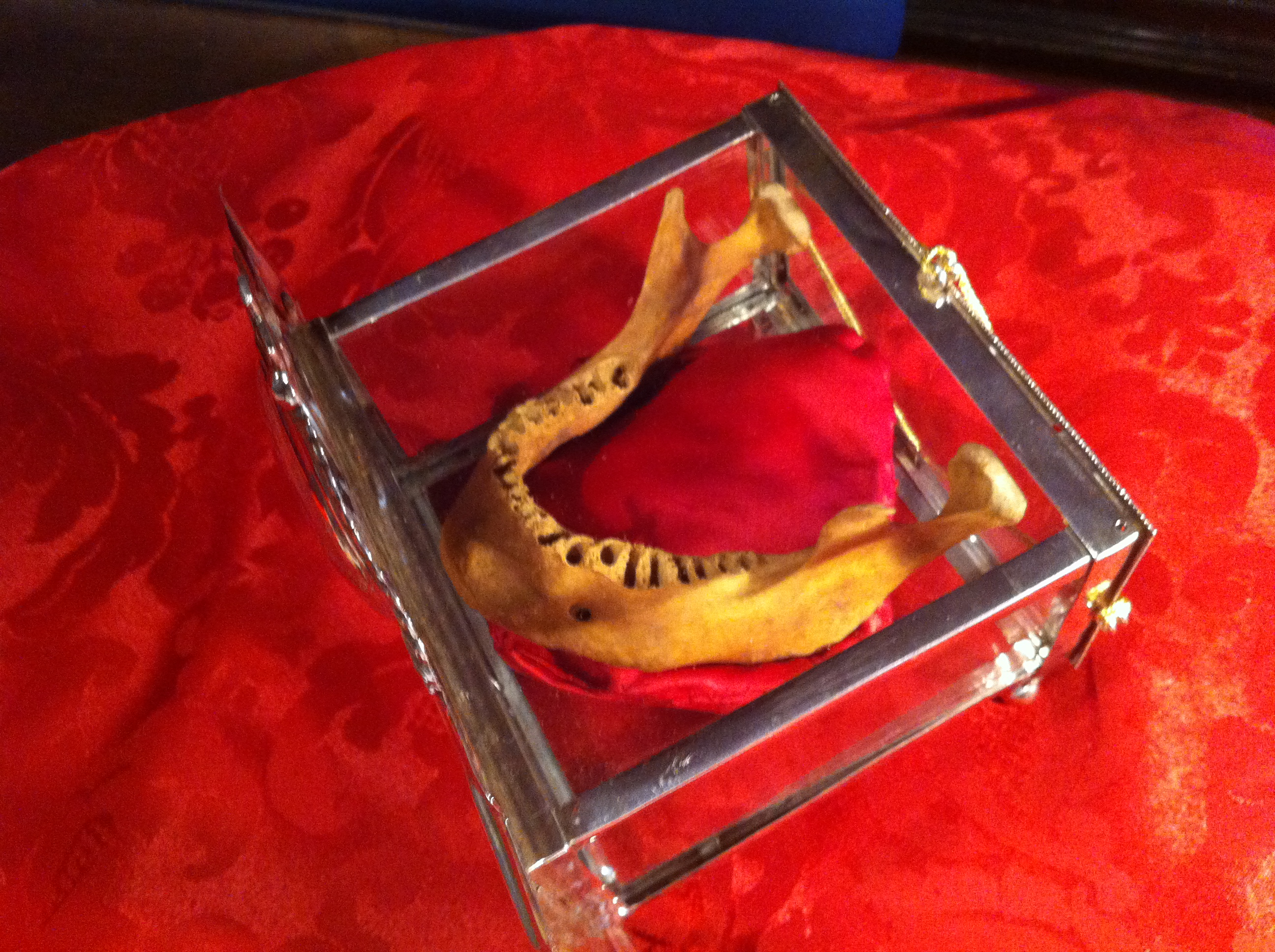 Reliquia de San Juan de Ávila, se conserva en Almodóvar del Campo su pueblo natal